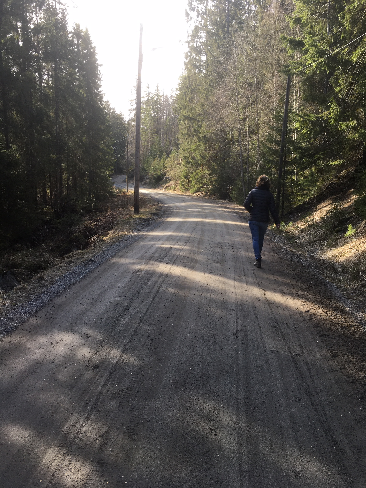 Hanåveien i Oslo 2020